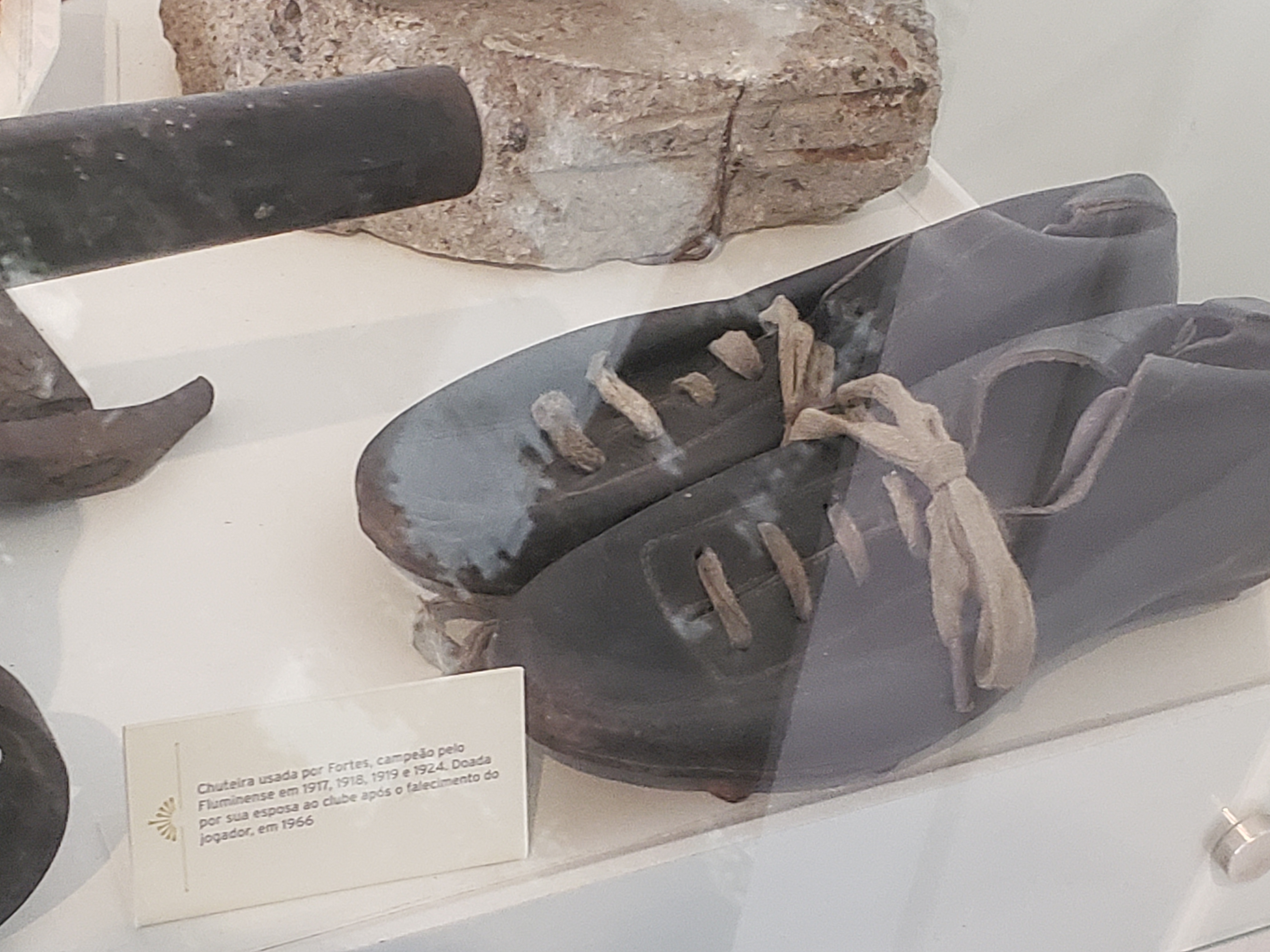 Chuteira usada pelo jogador Fortes campeão carioca pelo Fluminense Football Club em 1917-18-19-24.